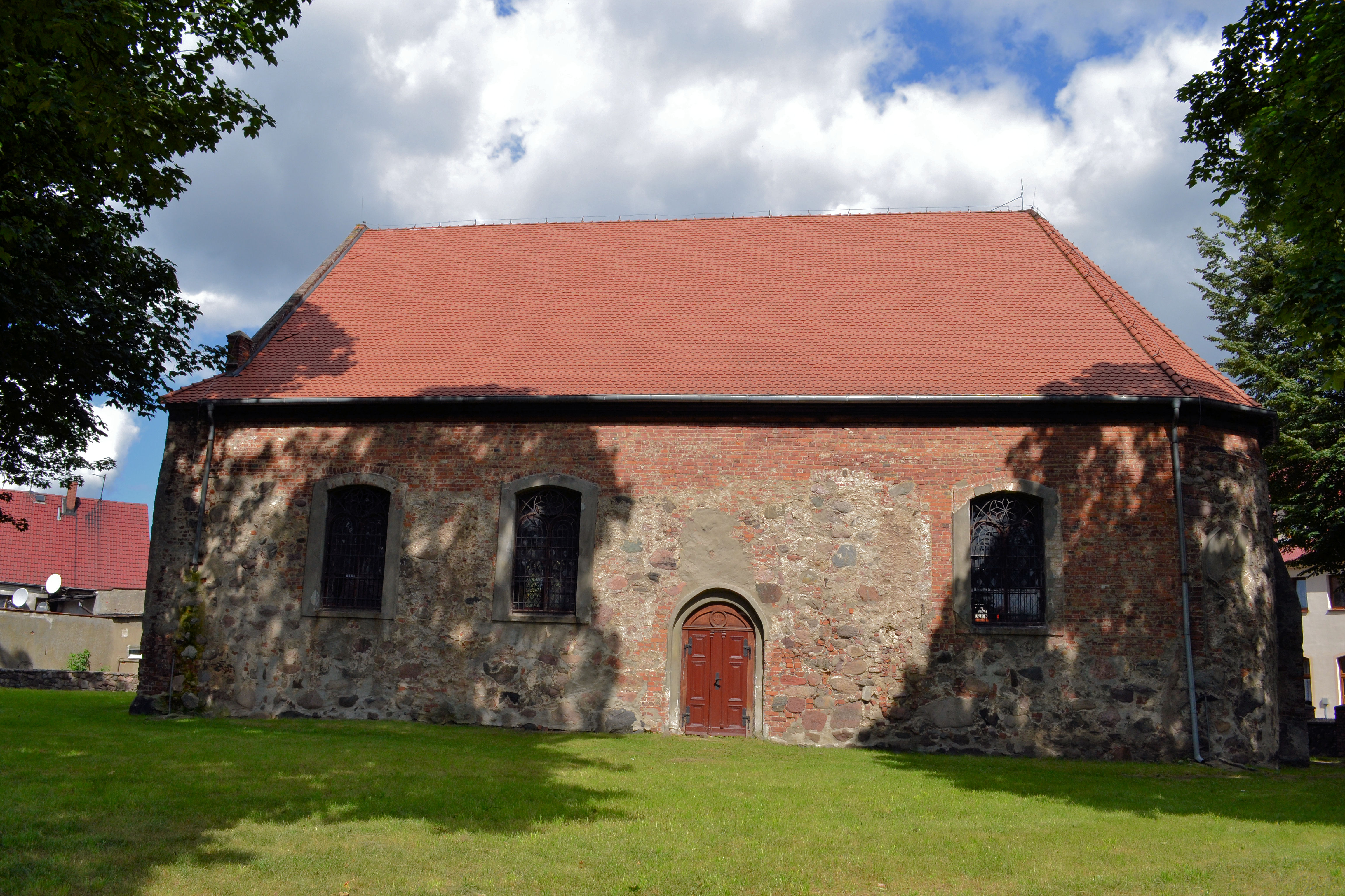 Kościół Świętej Trójcy w Czaplinku